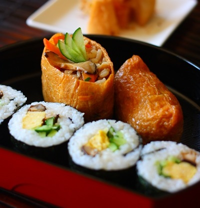 助六寿司（太巻きと稲荷寿司）